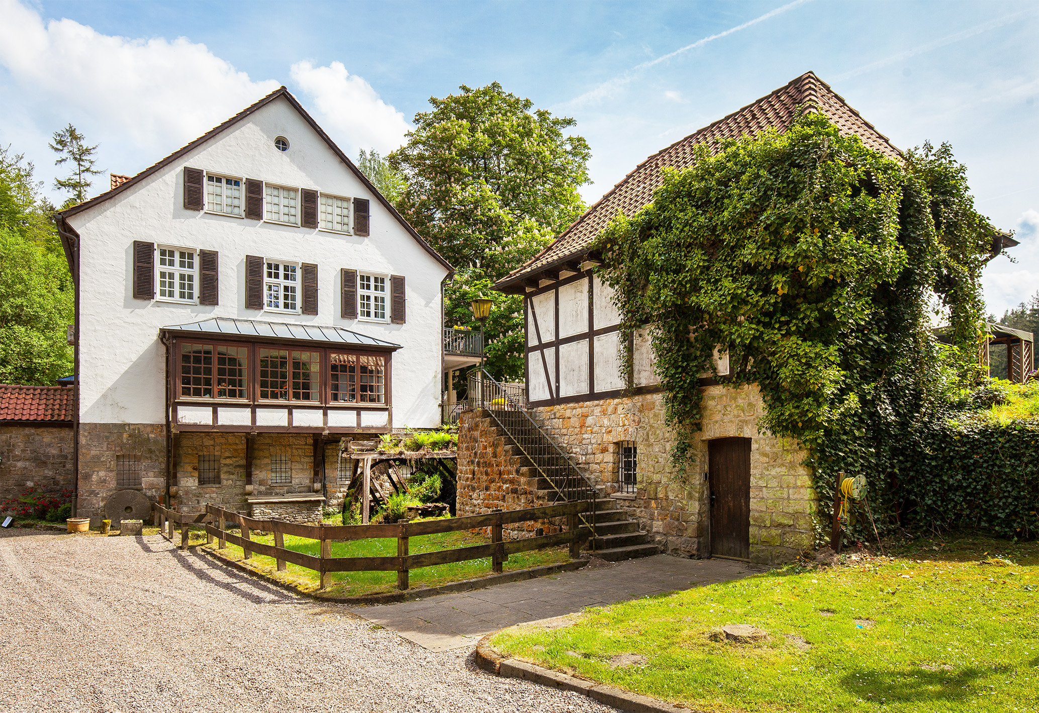 Die ehemalige Wassermühle "Silbermühle" in Leopoldstal, Gemeinde Horn-Bad Weinberg, Kreis Lippe, Nordrhein-Westfalen.